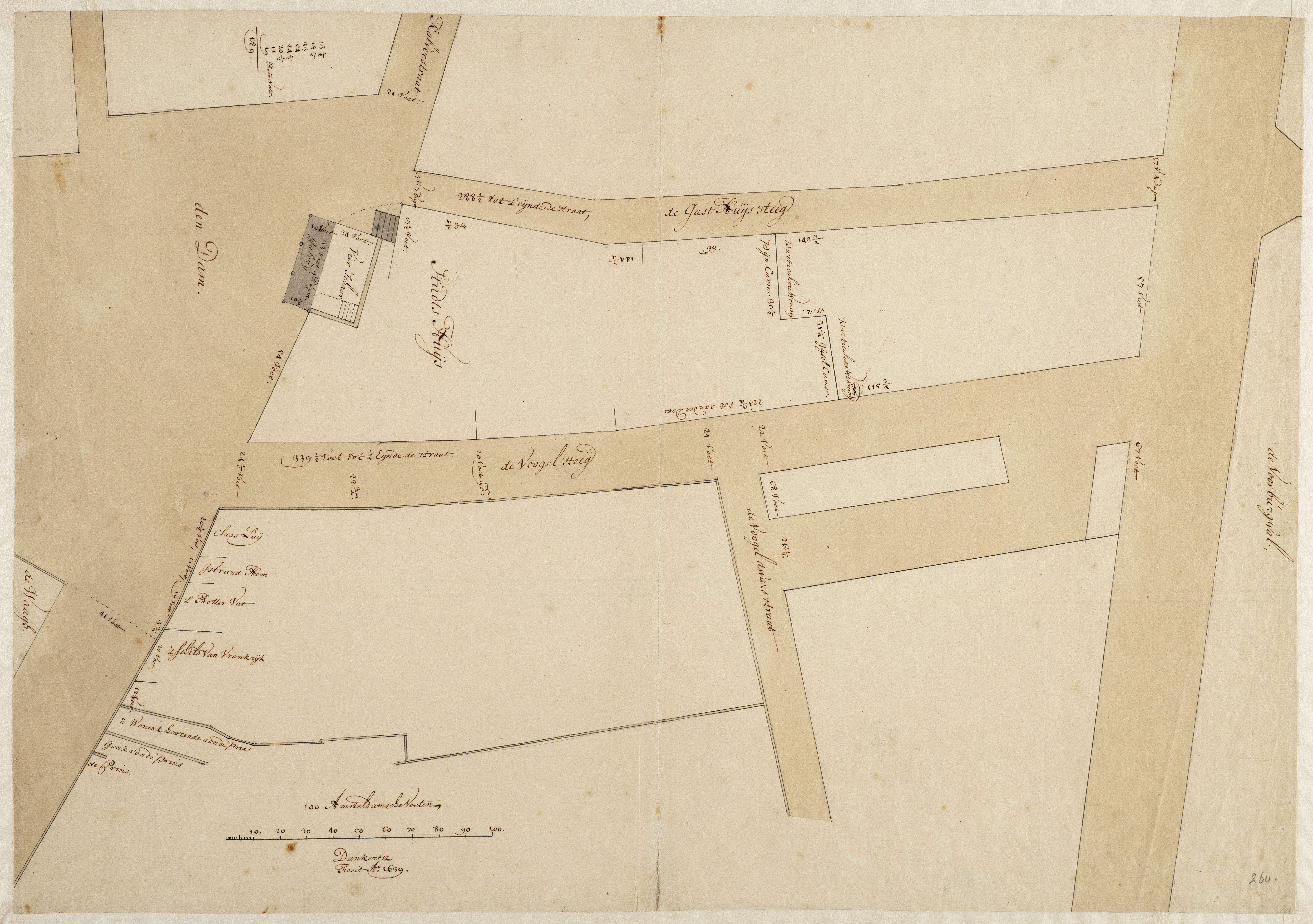 Plattegrond van de Dam. drawing. Amsterdam, Stadsarchief Amsterdam, Collectie Atlas Splitgerber.